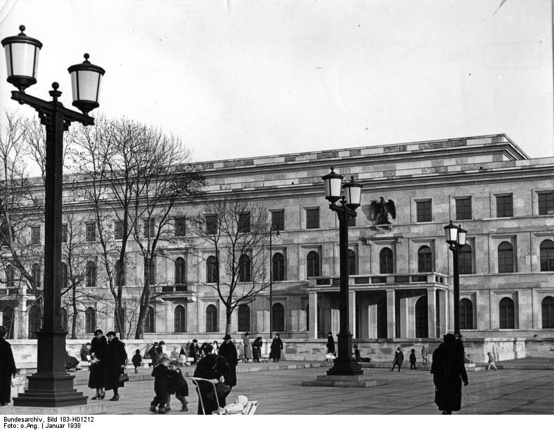 München, Königlicher Platz, Führerhaus Die Parteineubauten auf dem Königlichen Platz in München. Das Führerhaus. 25.1.38 [Herausgabedatum]